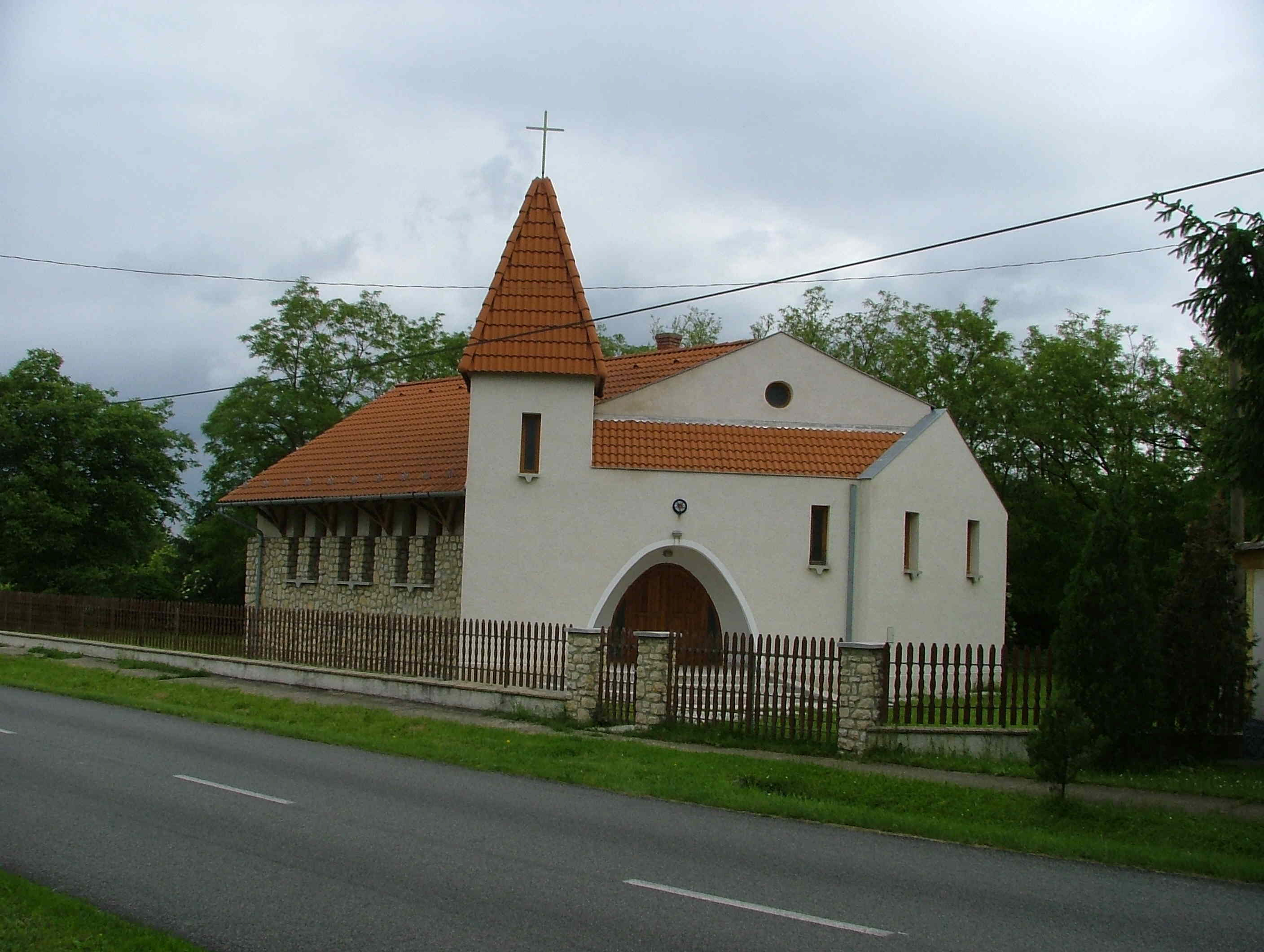 Kemenespálfa Evangelische Kirche